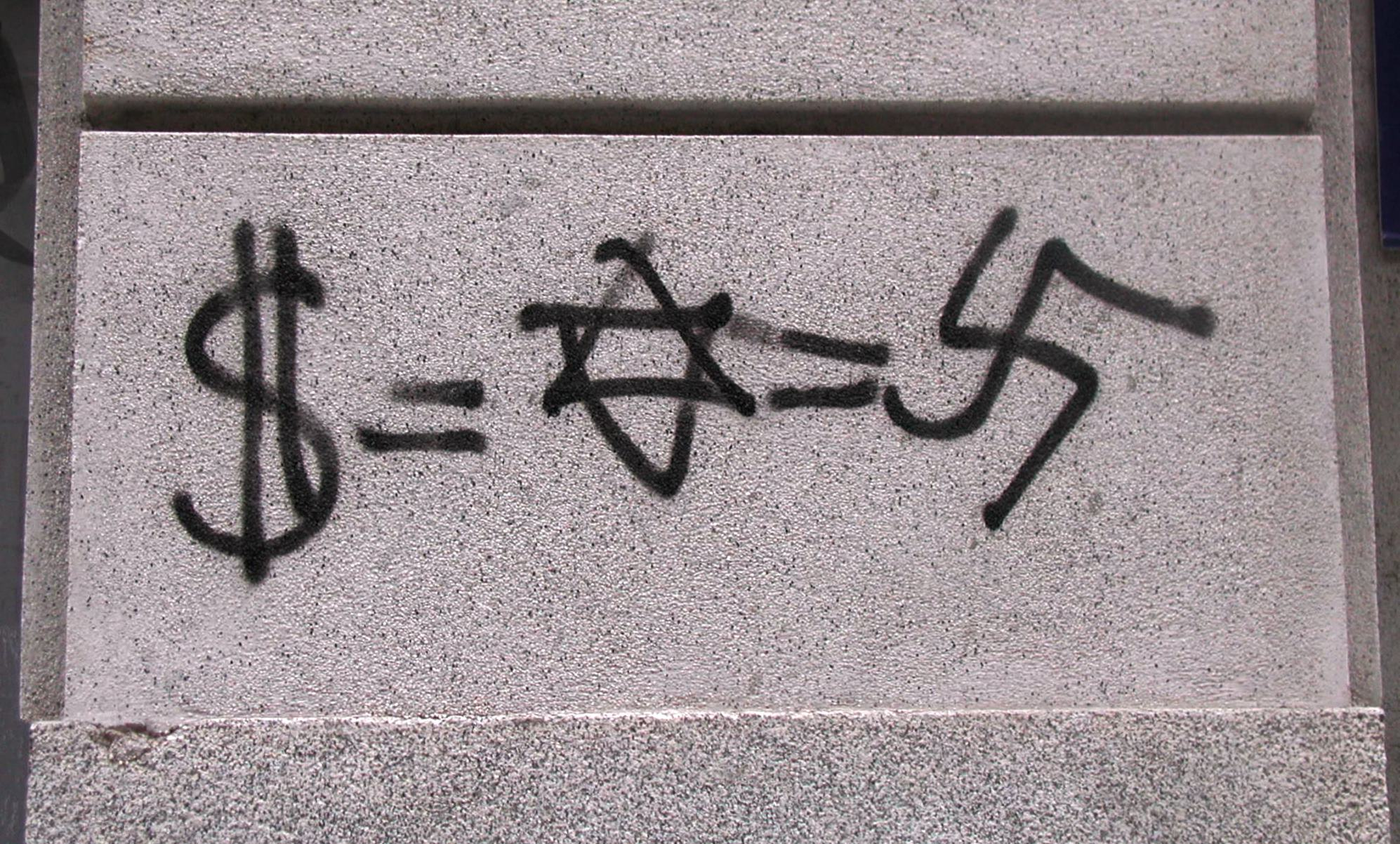 Pintada que iguala un símbolo de dolar, una estrella de David y una esvástica. Tomada en una calle del centro de Madrid (España)